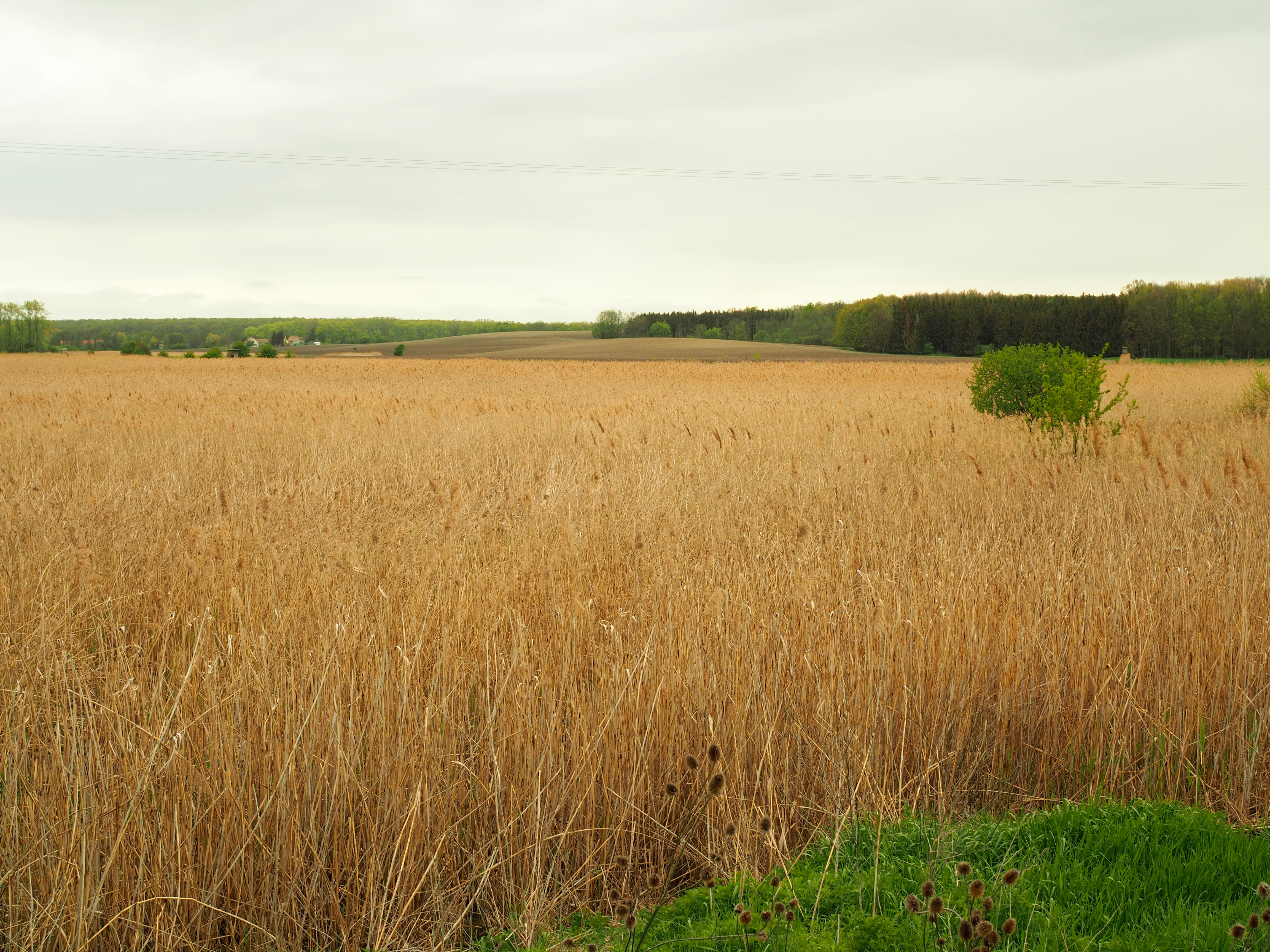 Rybník Zrcadlo u Kopidlna (Pond Zrcadlo near Kopidlno), rákosiny Project: Chráněná území.